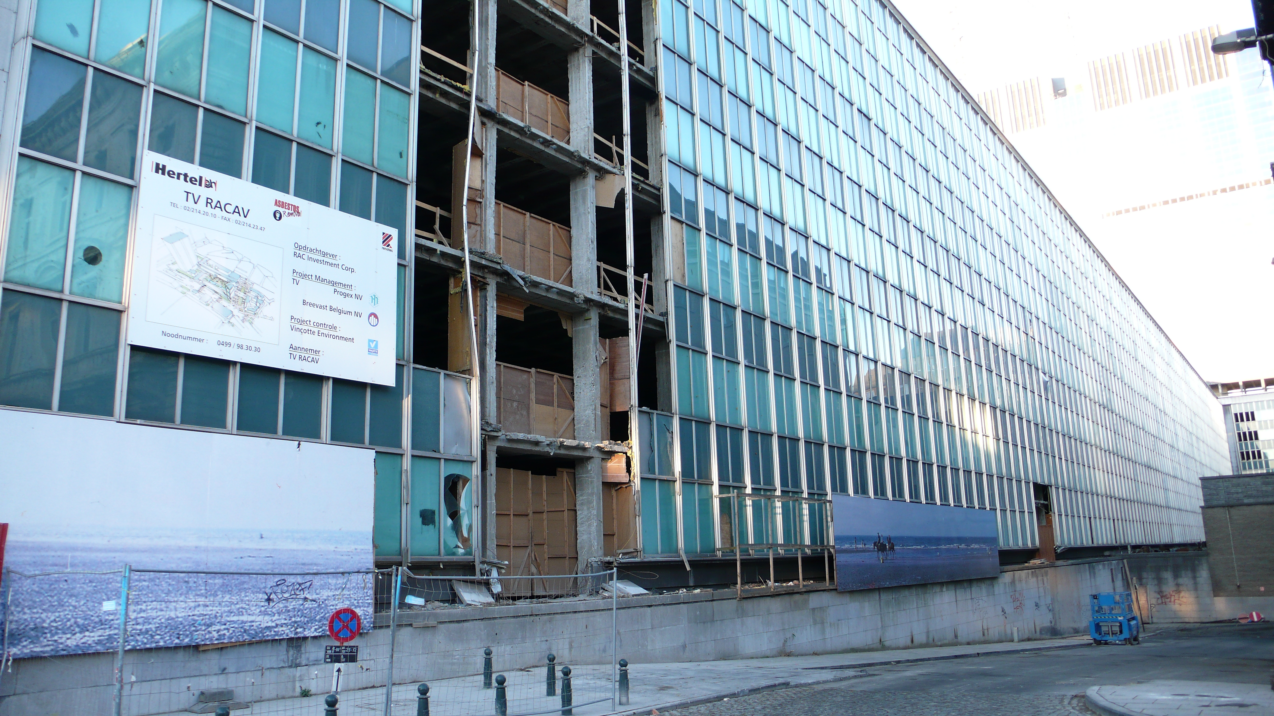 Démantèlement de la Cité Administrative de l'Etat côté rue Royale